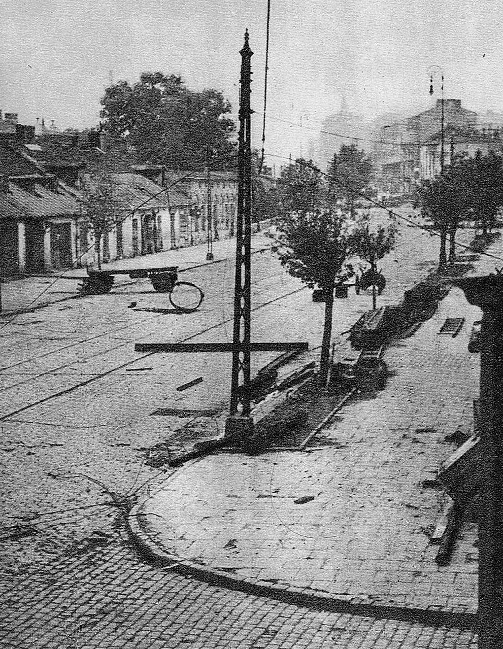 Ulica Wolska 1 sierpnia 1944 kilka godzin po rozpoczęciu akcji powstańczej